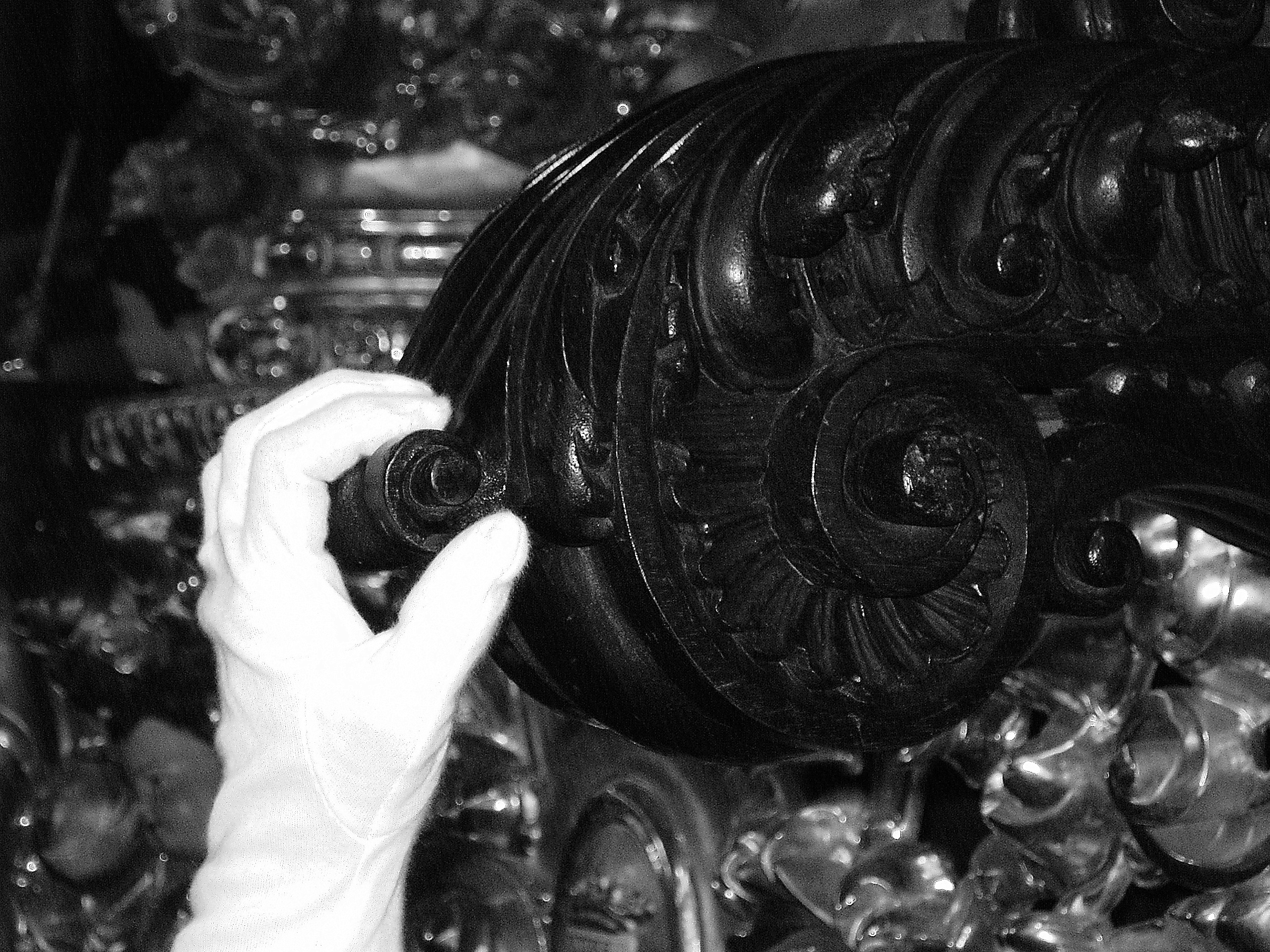 Semana Santa Huelva